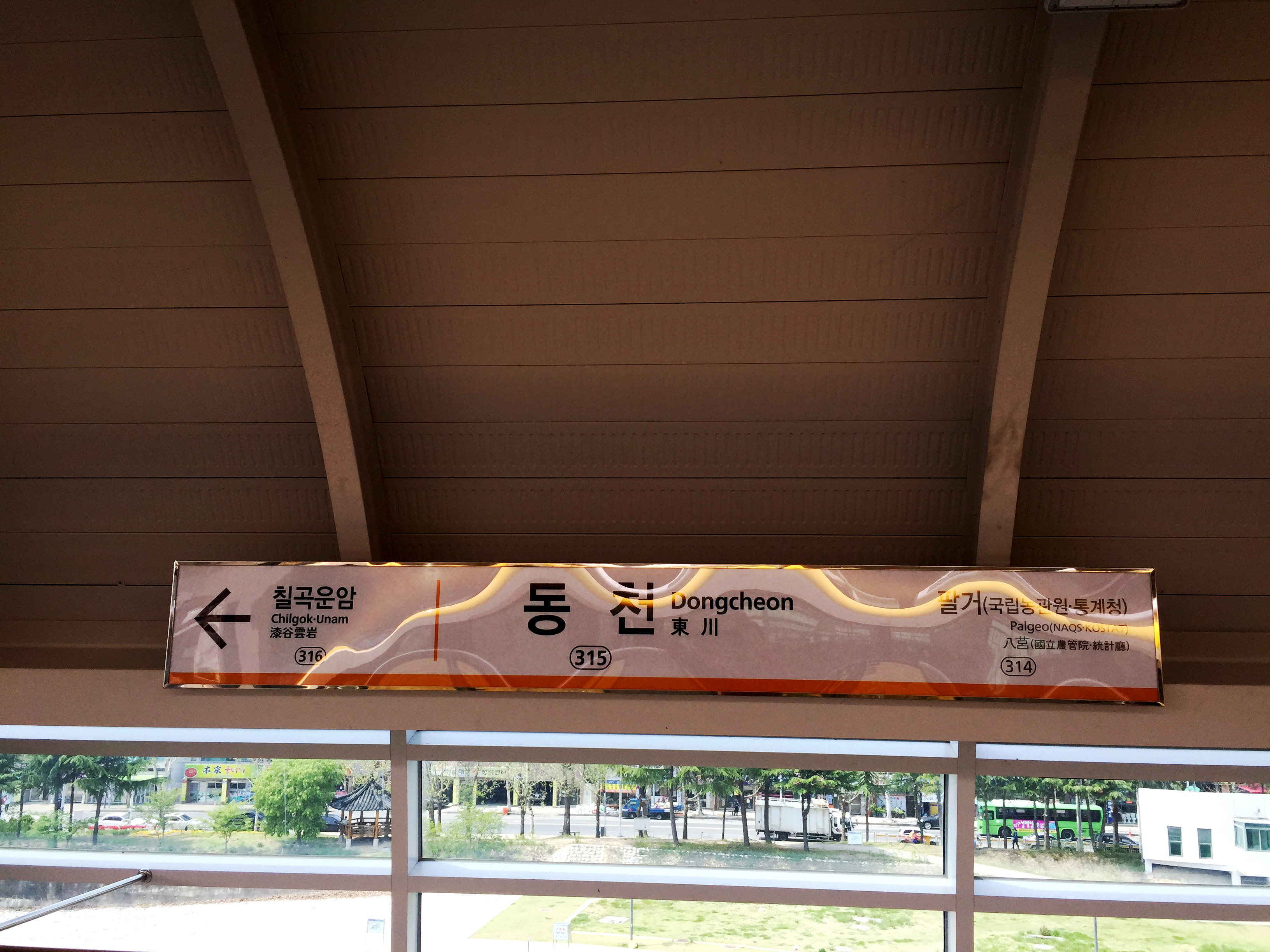 대구3호선 동천역 역명판